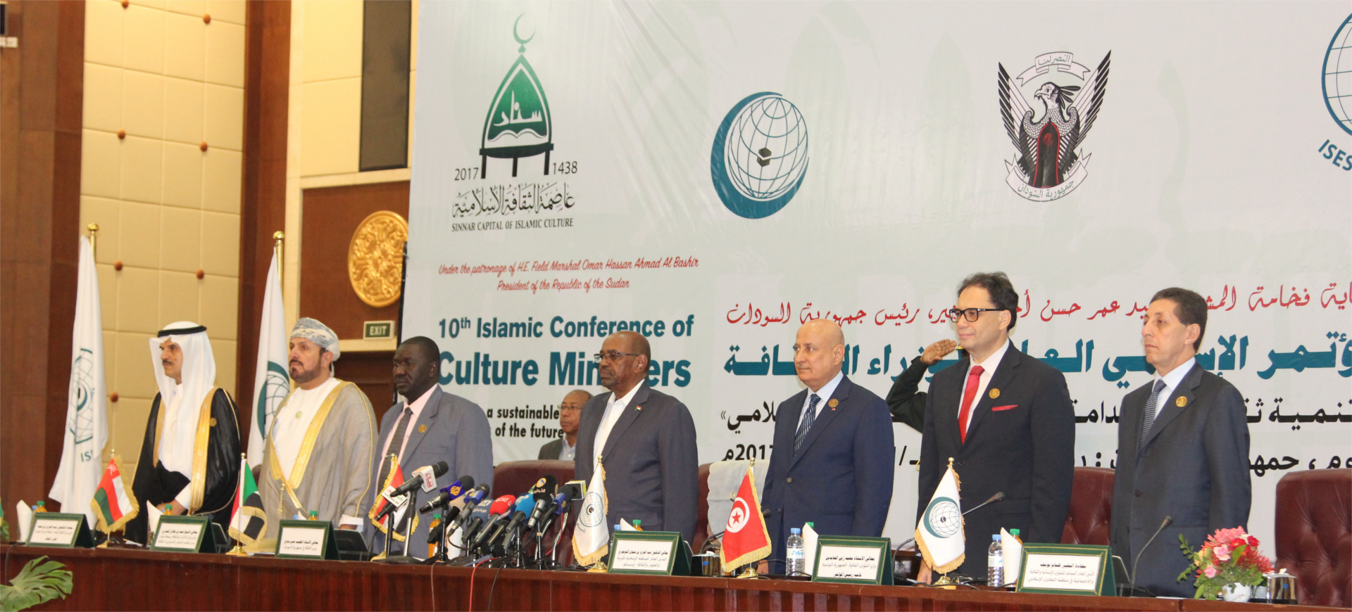 La Conférence islamique des Ministres de la Culture a tenu dix sessions : la première à Dakar, en République du Sénégal (janvier 1989), la deuxième à Rabat, au Royaume du Maroc (novembre 1998), la troisième à Doha, à l’Etat du Qatar (décembre 2001), la quatrième à Alger, en République Algérienne Démocratique et Populaire (décembre 2004) et la cinquième à Tripoli, Etat de Libye (novembre 2007). La sixième Conférence a été tenue en octobre 2009 à Bakou, République d’Azerbaïdjan, la septième a été tenue à Alger, en République Algérienne Démocratique et Populaire (décembre 2011), la huitième session a eu lieu à Al-Madinah Al-Munawwarah, Royaume d’Arabie Saoudite (janvier 2014), la neuvième session a été tenue à Mascate, Sultanat d’Oman (novembre 2015), tandis que la dixième session a eu lieu à Khartoum, République du Soudan (novembre 2017).